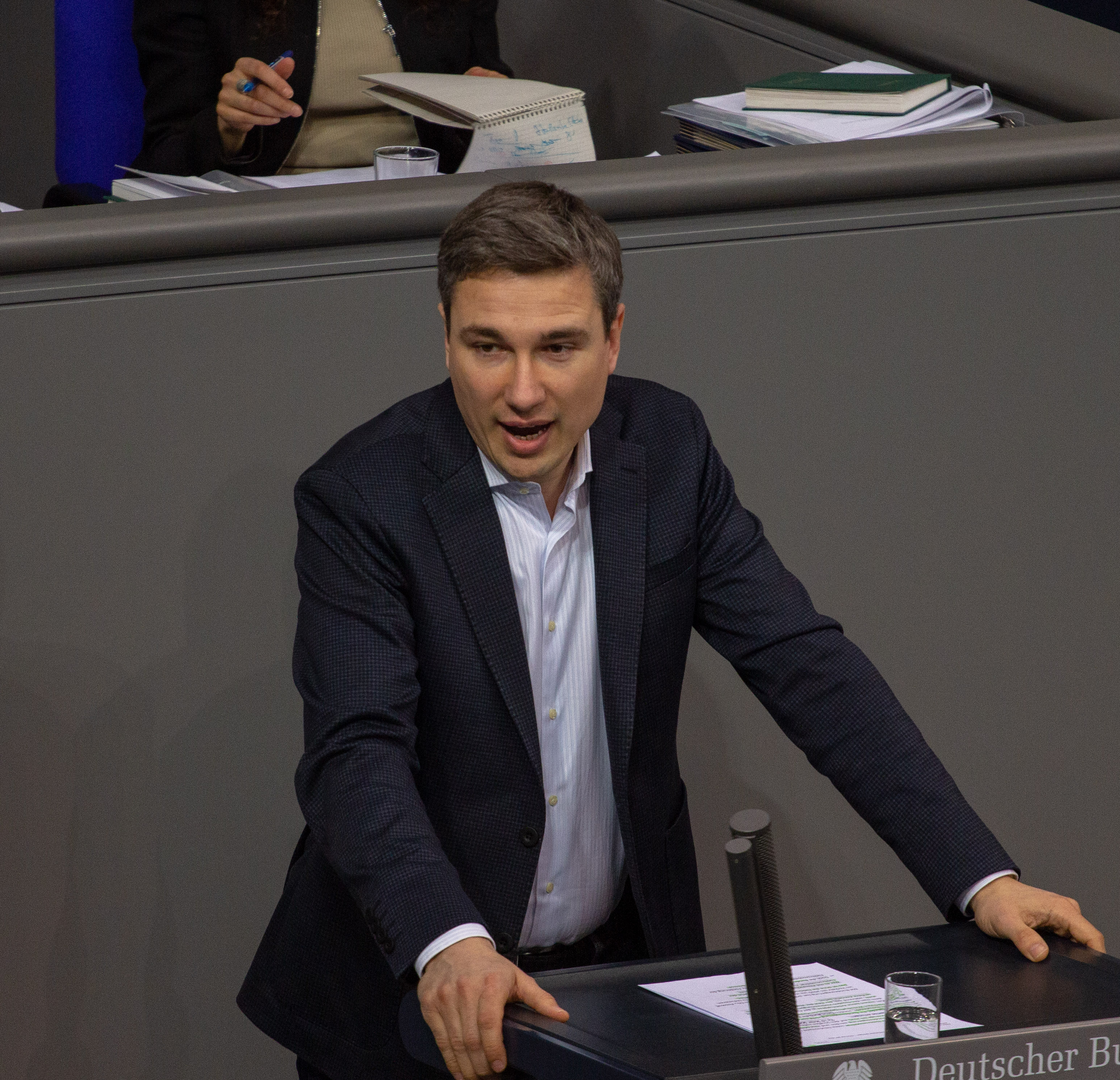 Stephan Kühn, Mitglied des Deutschen Bundestages, während einer Plenarsitzung am 11. April 2019 in Berlin.